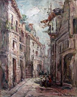 Casas EDKabregu 1929